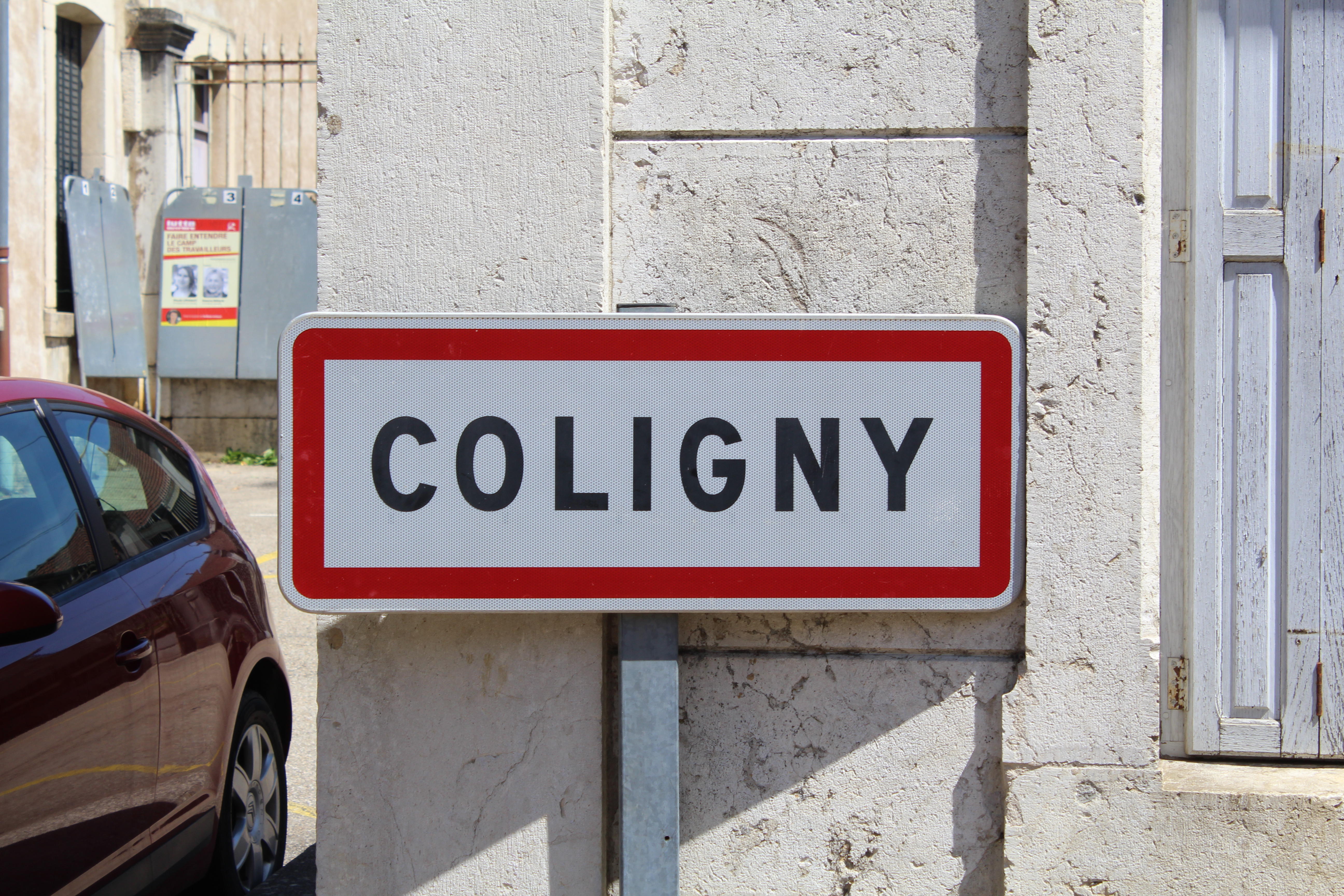 Panneau d'entrée de Coligny devant le poids public du village.